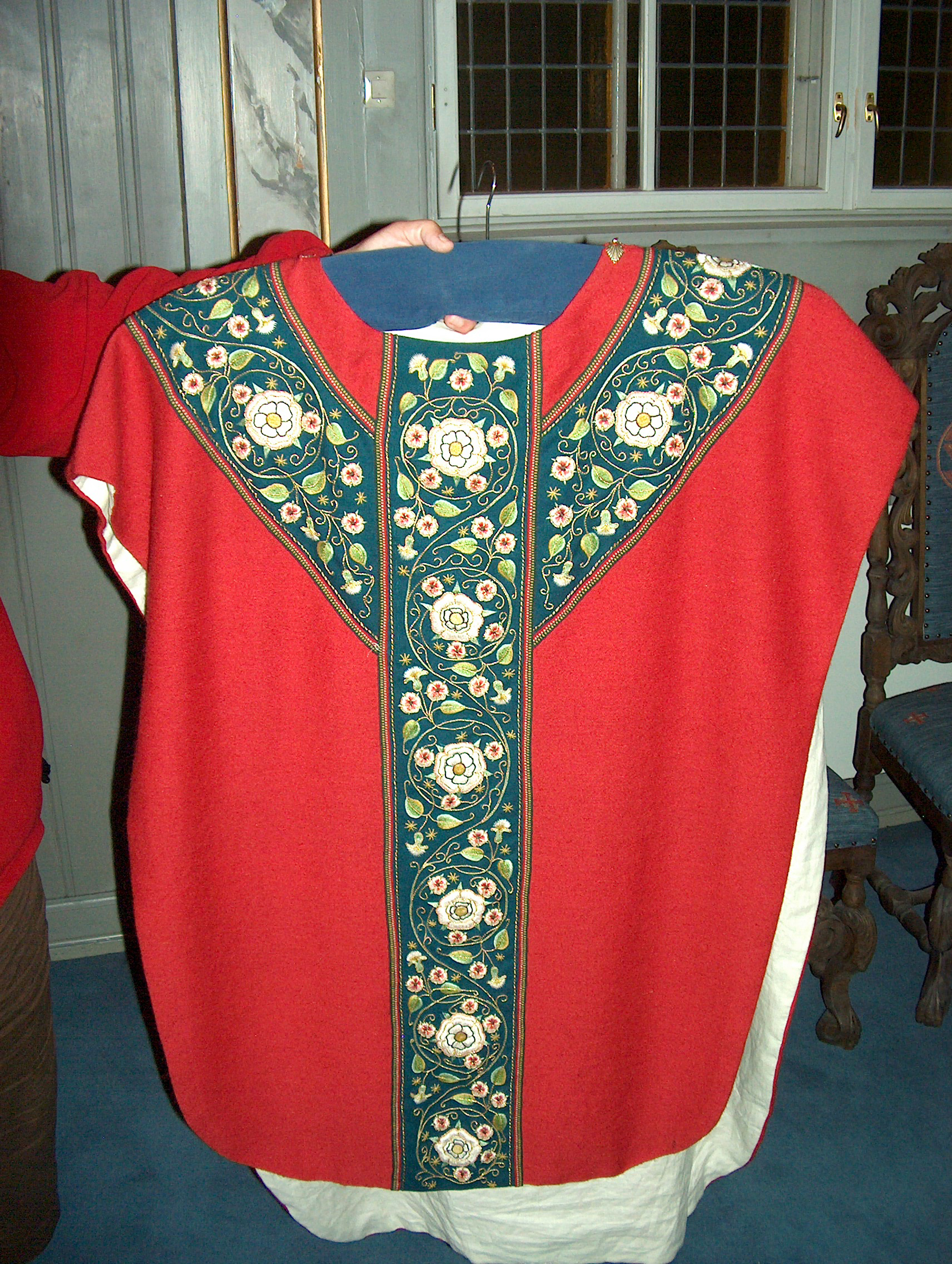 Lunder kirke, Sokna (messehagl)